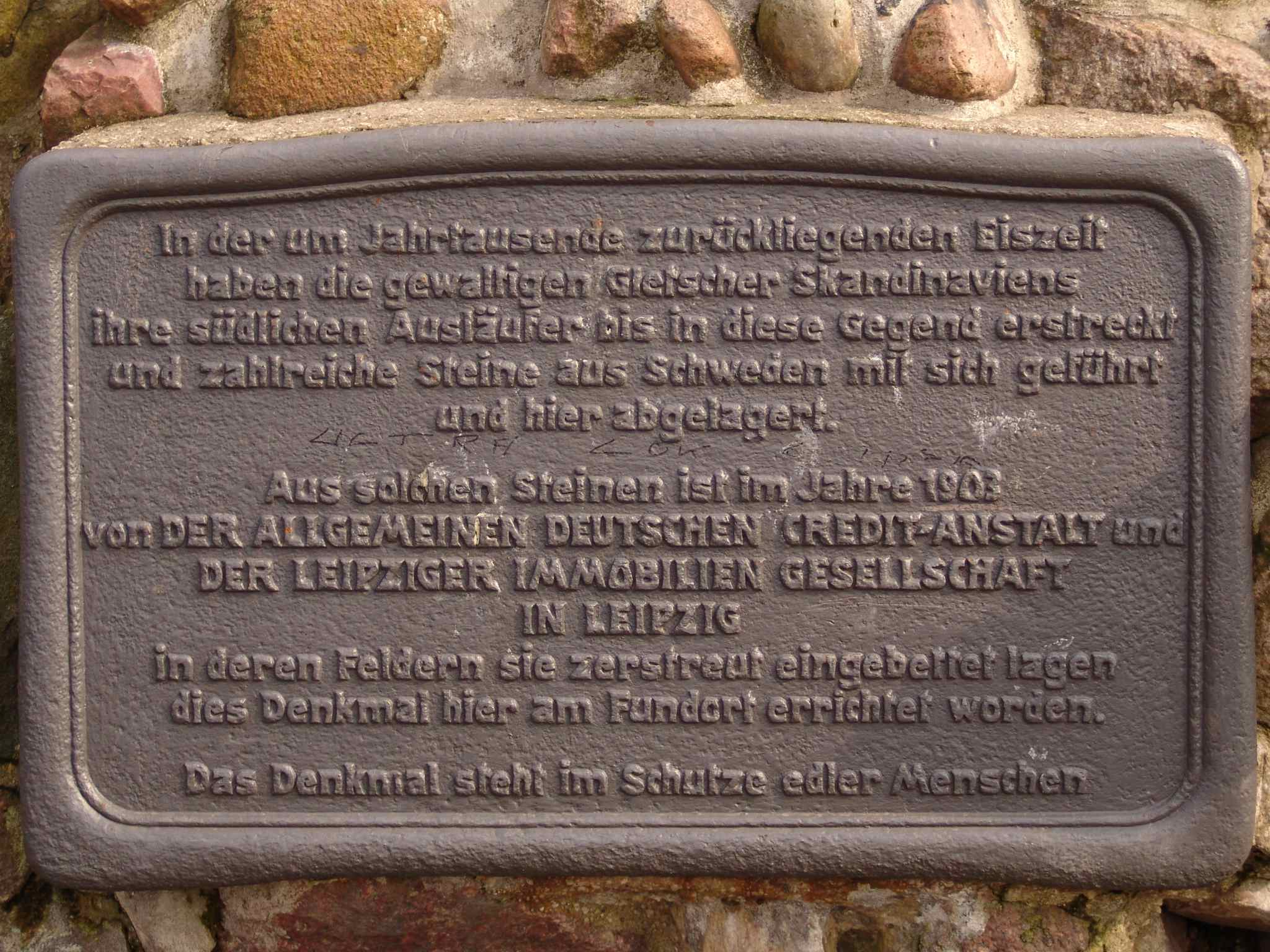 Inschrift der Gletschersteinpyramide in Leipzig-Stötteritz (2005)